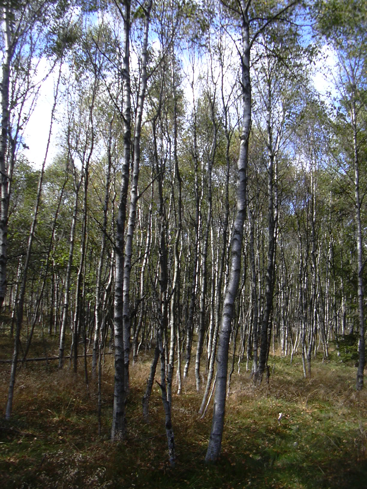 Red Moor, Rhön, Hesse/Germany